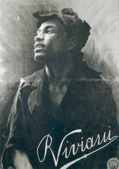 Raffaele Viviani : manifesto con firma di " Scugnizzo" 1905